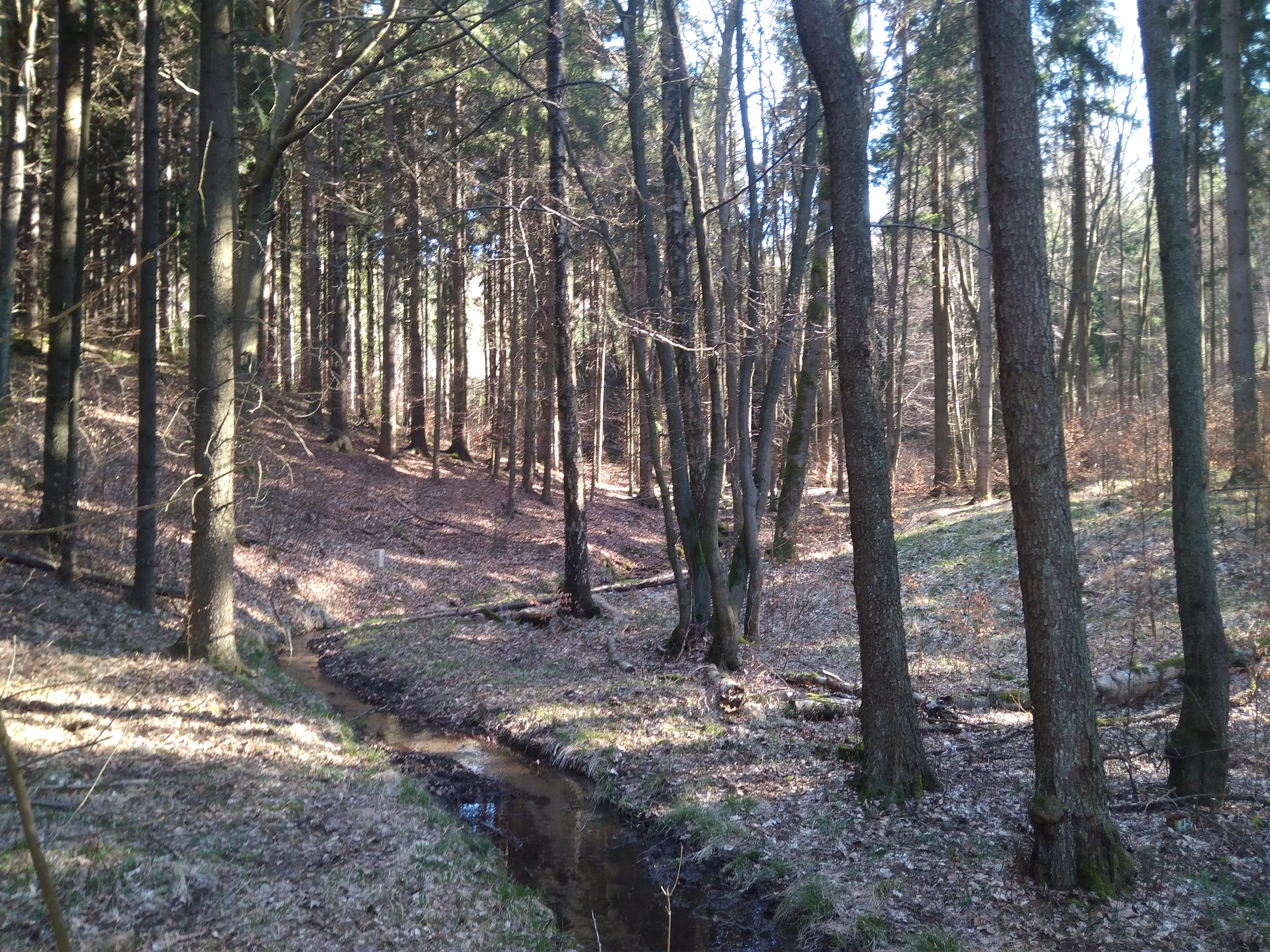 Hraniční potok alias Wolfsbach na česko-německé hranici (Mikulášovice/Sebnitz)